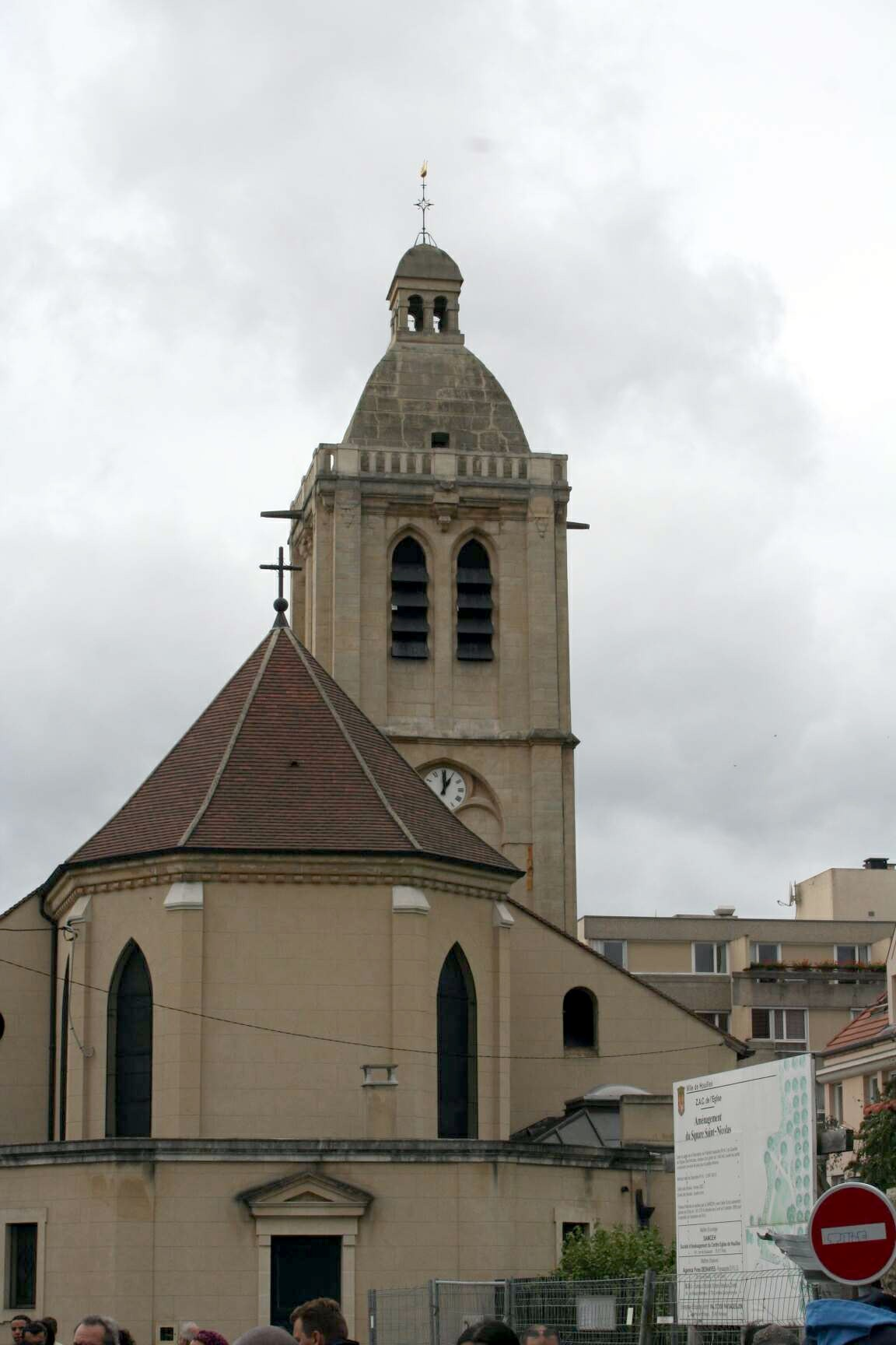 Église de Houilles - Yvelines (France)